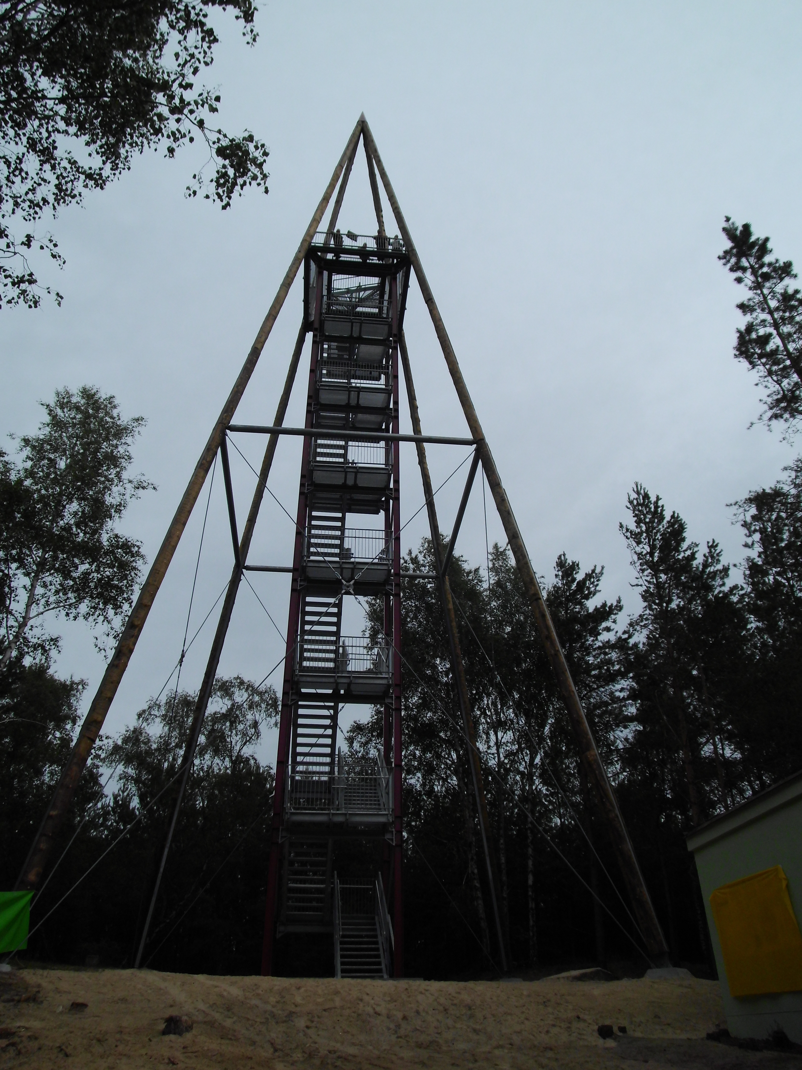 Aussichtsturm (Baujahr 2012) auf dem Götzer Berg in Brandenburg, an der Stelle eines früheren trigonometrischen Signal- und Beobachtungsturms